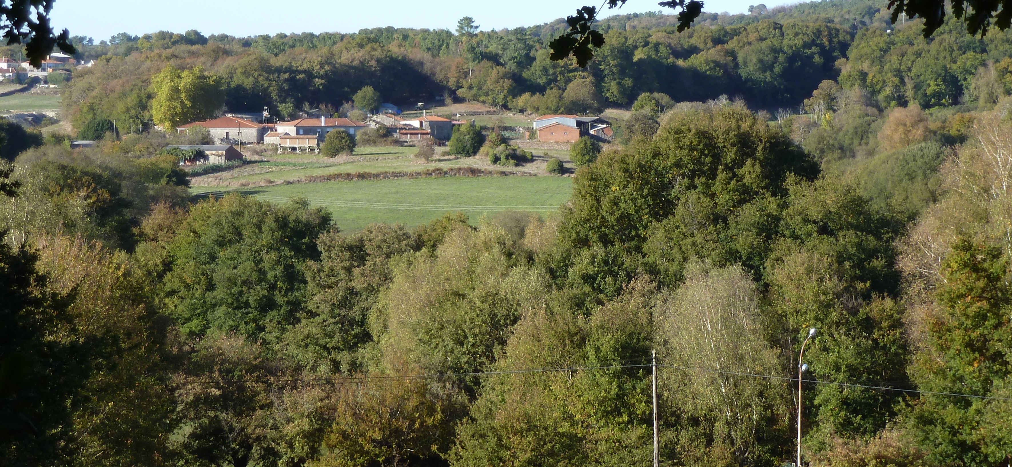 O Barrio de Puga, Pradeda, Carballedo